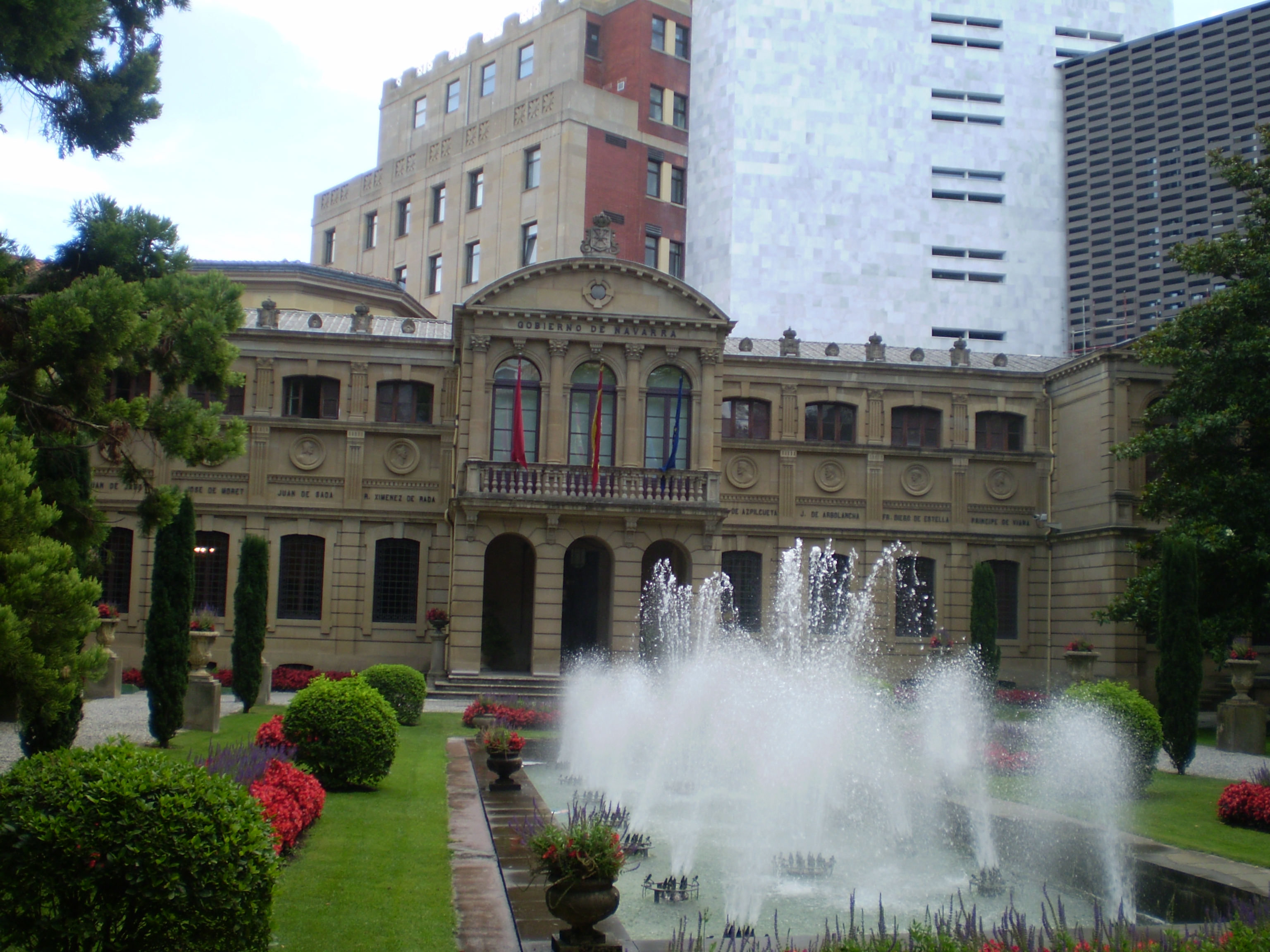 Jardines del Palacio de Navarra en Pamplona